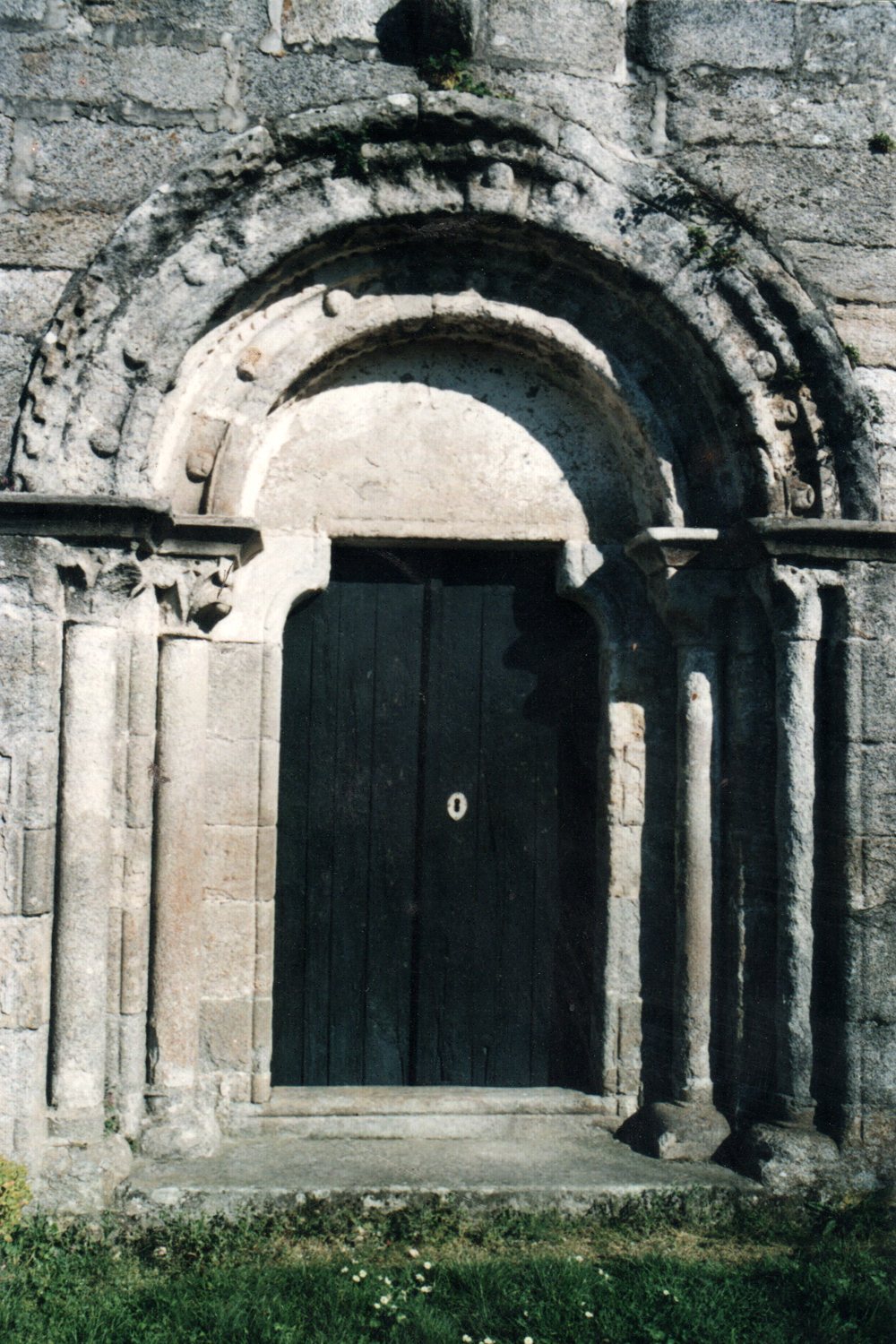 Portada principal de la iglesia de O Salvador de Vileiriz (Páramo)